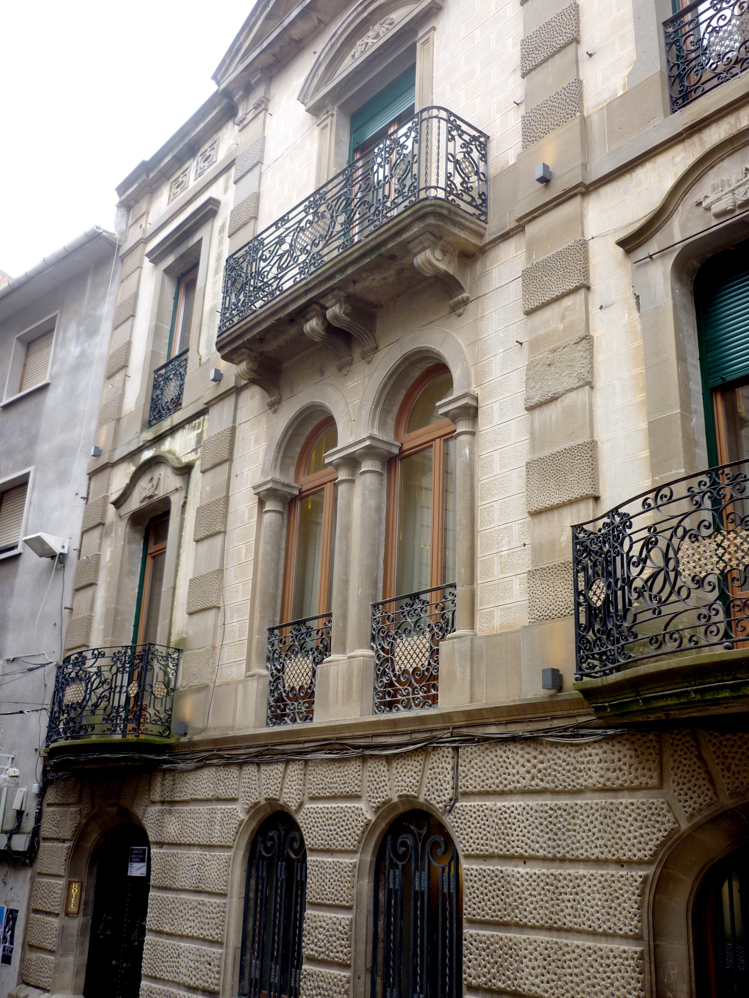 Cal Piteu (Guissona)